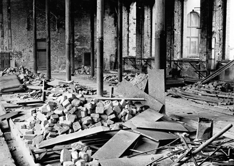 Berlin, Humboldt-Universität, Chemie-Institut, Ruine Zentralbild Quaschinsky 5.12.50 Im chemischen Institut der Berliner Humboldt-Universität Zerstörte Hör- und Arbeitssäle des Chemischen Instituts der Berliner Humboldt-Universität werden im Aufbauplan Berlins wieder aufgebaut. UBz: Dieser durch den Krieg zerstörte Arbeitssaal wird 1951 ausgebaut werden und unseren jungen Studenten zum Lernen zur Verfügung stehen.